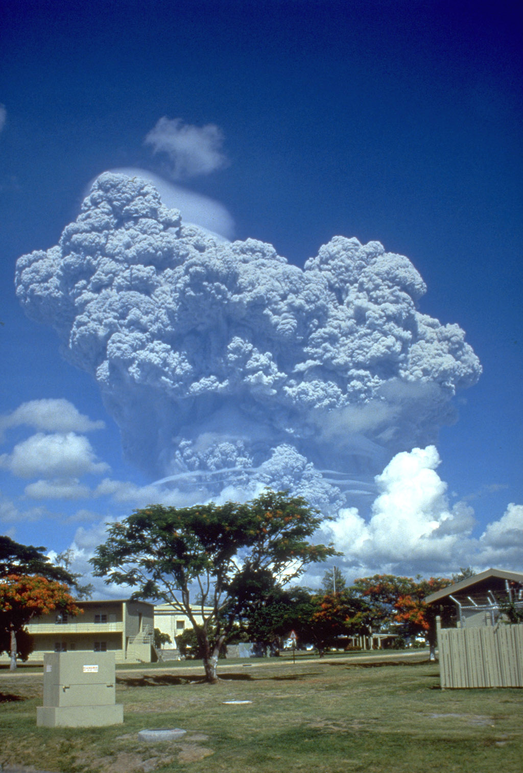 Der Pinatubo Ausbruch am 12. Juni 1991, gesehen von der Clark Air Base, etwa 40 km östlich des Vulkangipfels. Copyright info